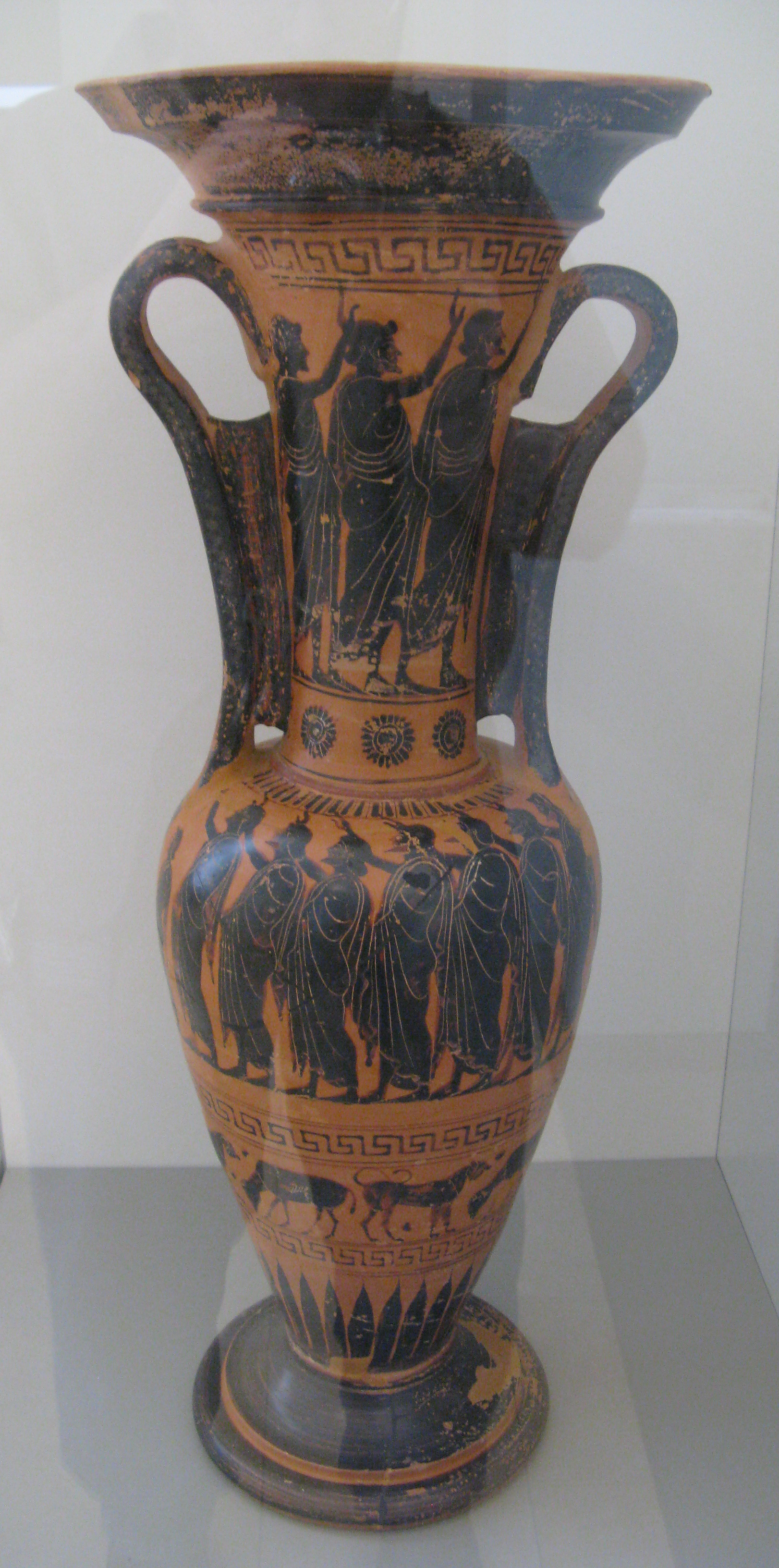 Klagende Frauen und Männer an der Totenbahre (Prothesis). Attisch-schwarzfiguriger Grabloutrophoros. Ansicht von vorn. Um 510/500 v. Chr. Gefunden in Trachoraes bei Athen. Antikensammlung Berlin/Altes Museum